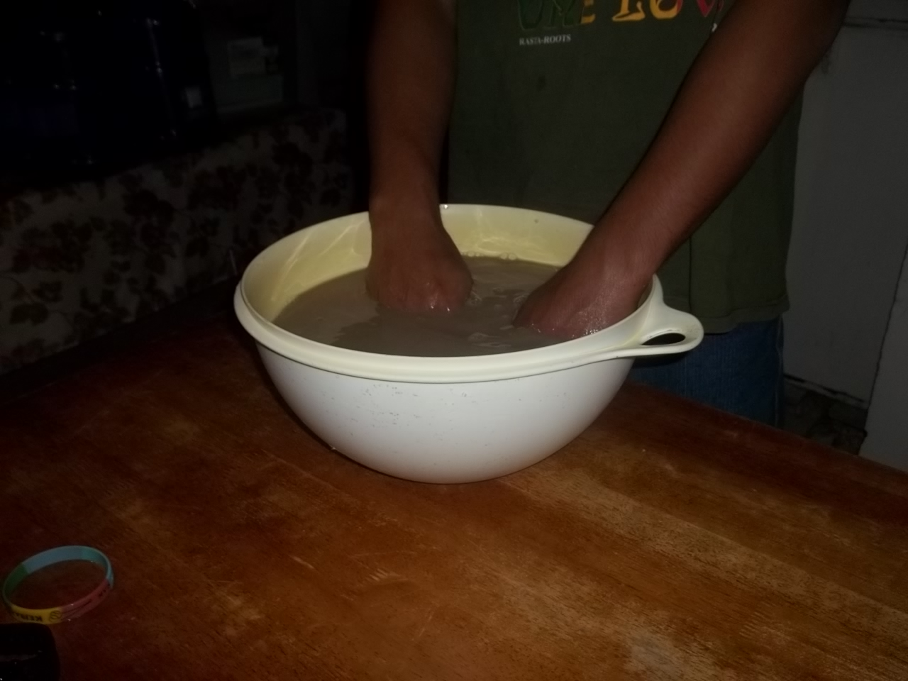 A Pohnpeian man in Dandan prepares kava.